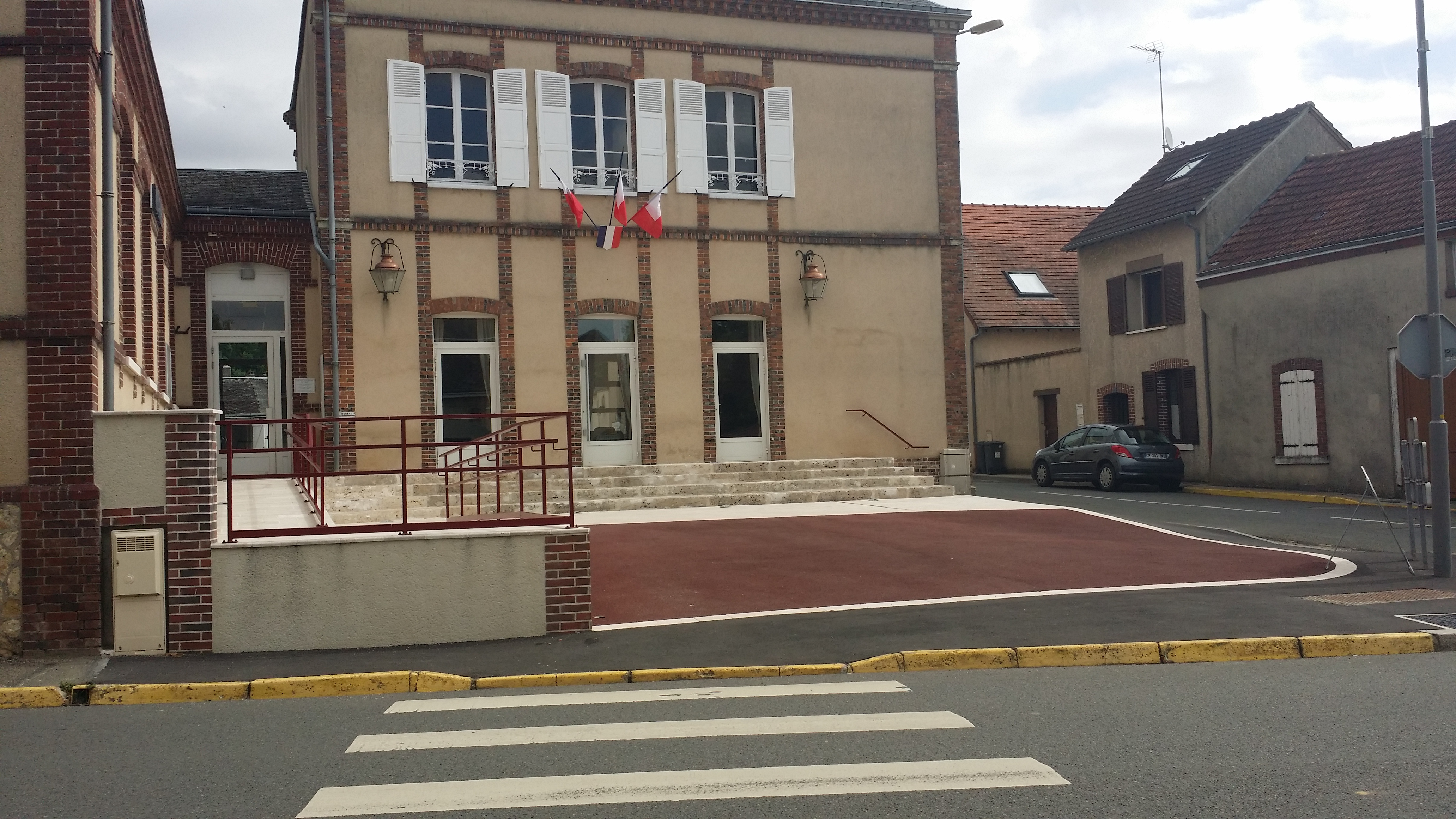 Visite de Sours (28), mairie